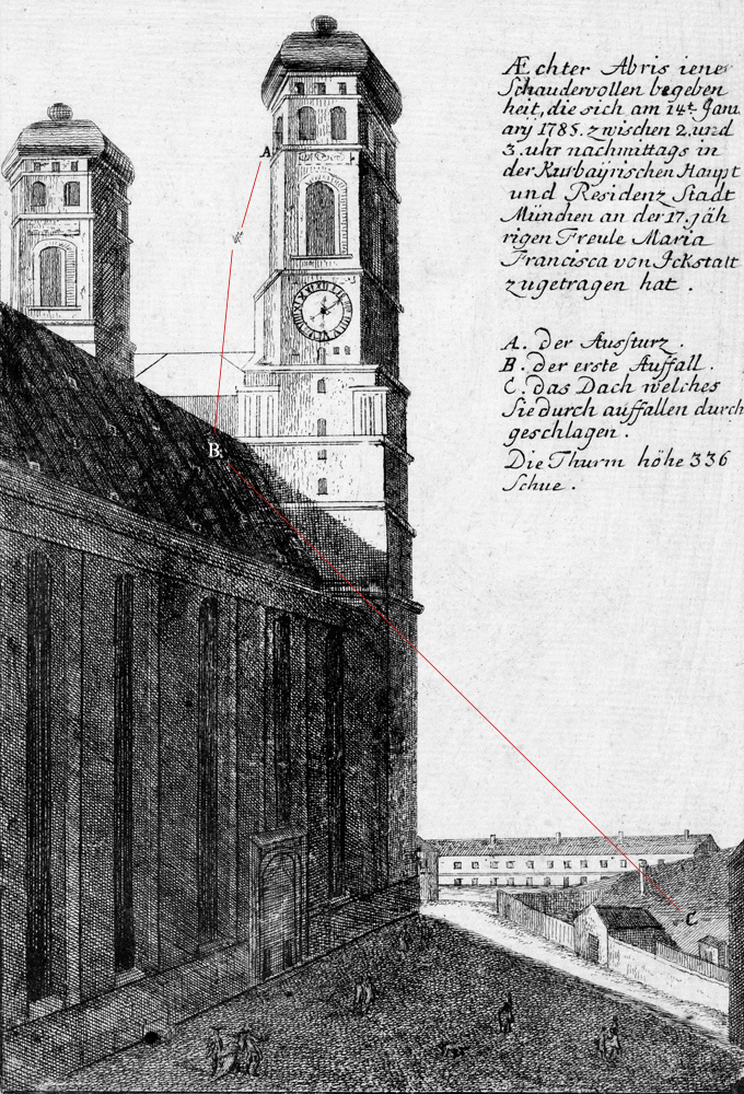 Rekonstruktion von Fannys Sturz